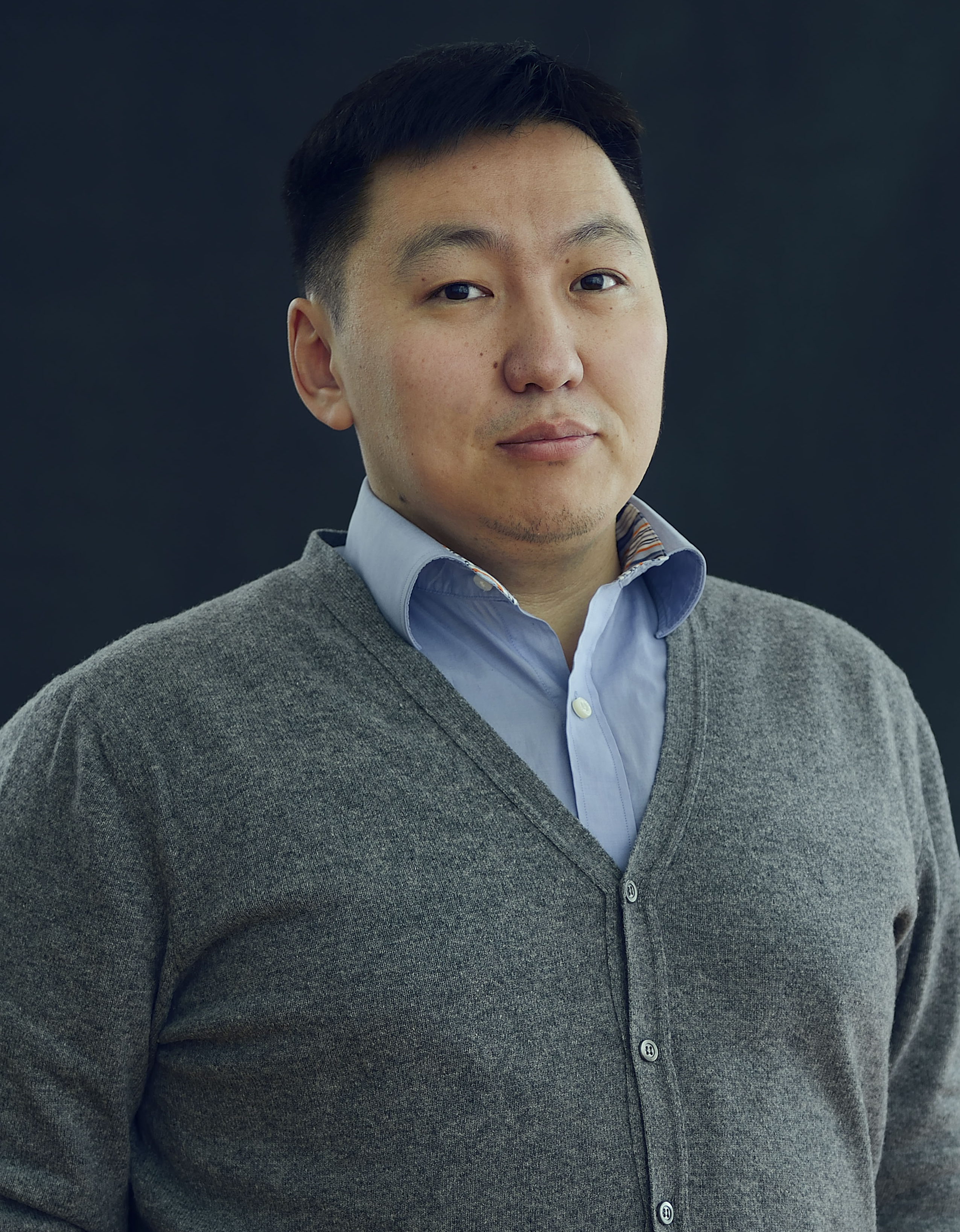 Монгол: Александрын Миеэгомбо